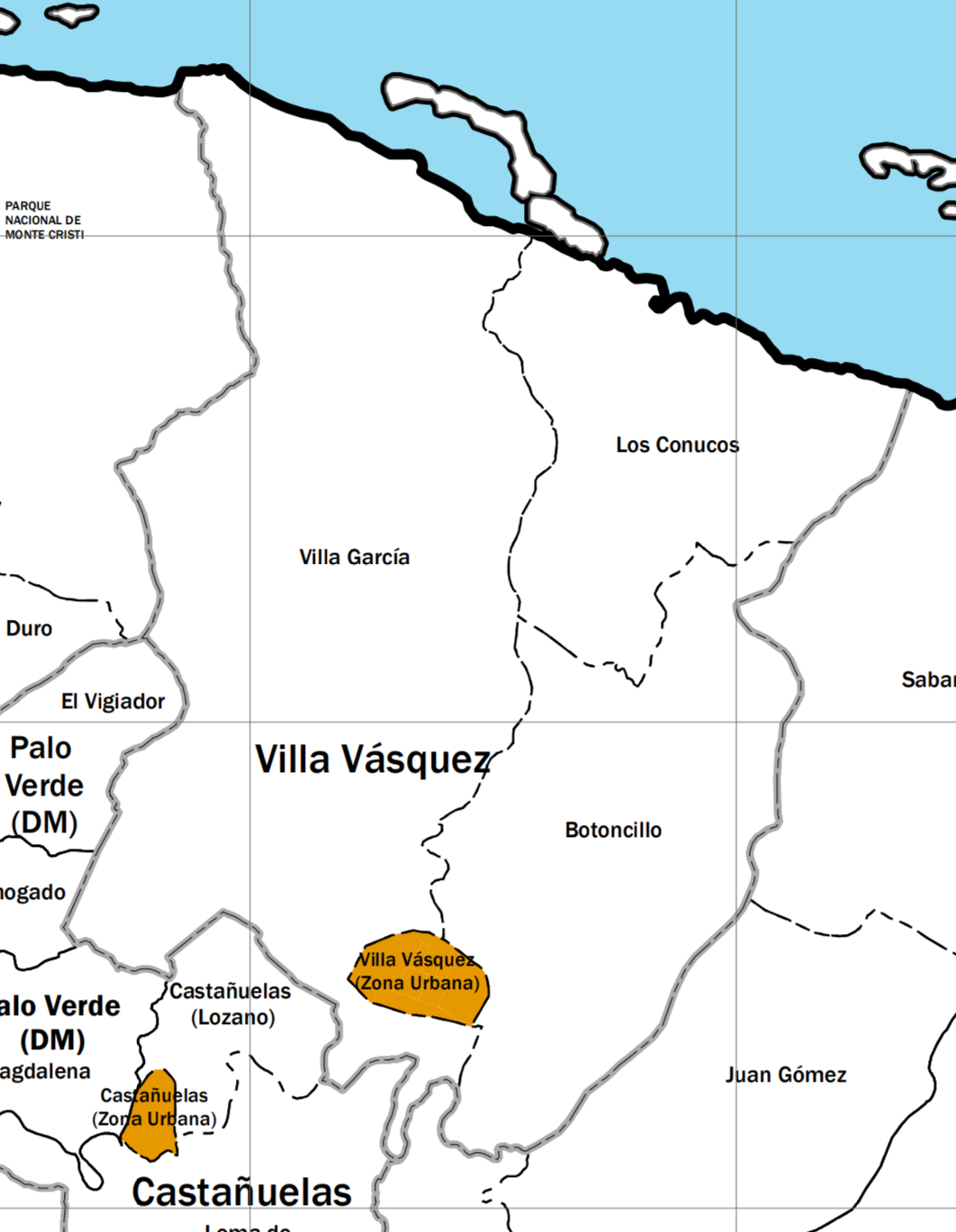 Mapa Político